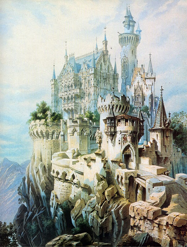 Dieses Gemälde (von Theatermaler Christian Jank) zeigt das Märchenschloss, das König Ludwig II. von Bayern noch 3 Jahre vor seinem Tod plante (1883). Die Ausführung wurde bereits begonnen, nach dem Tode Ludwigs jedoch wieder eingestellt.